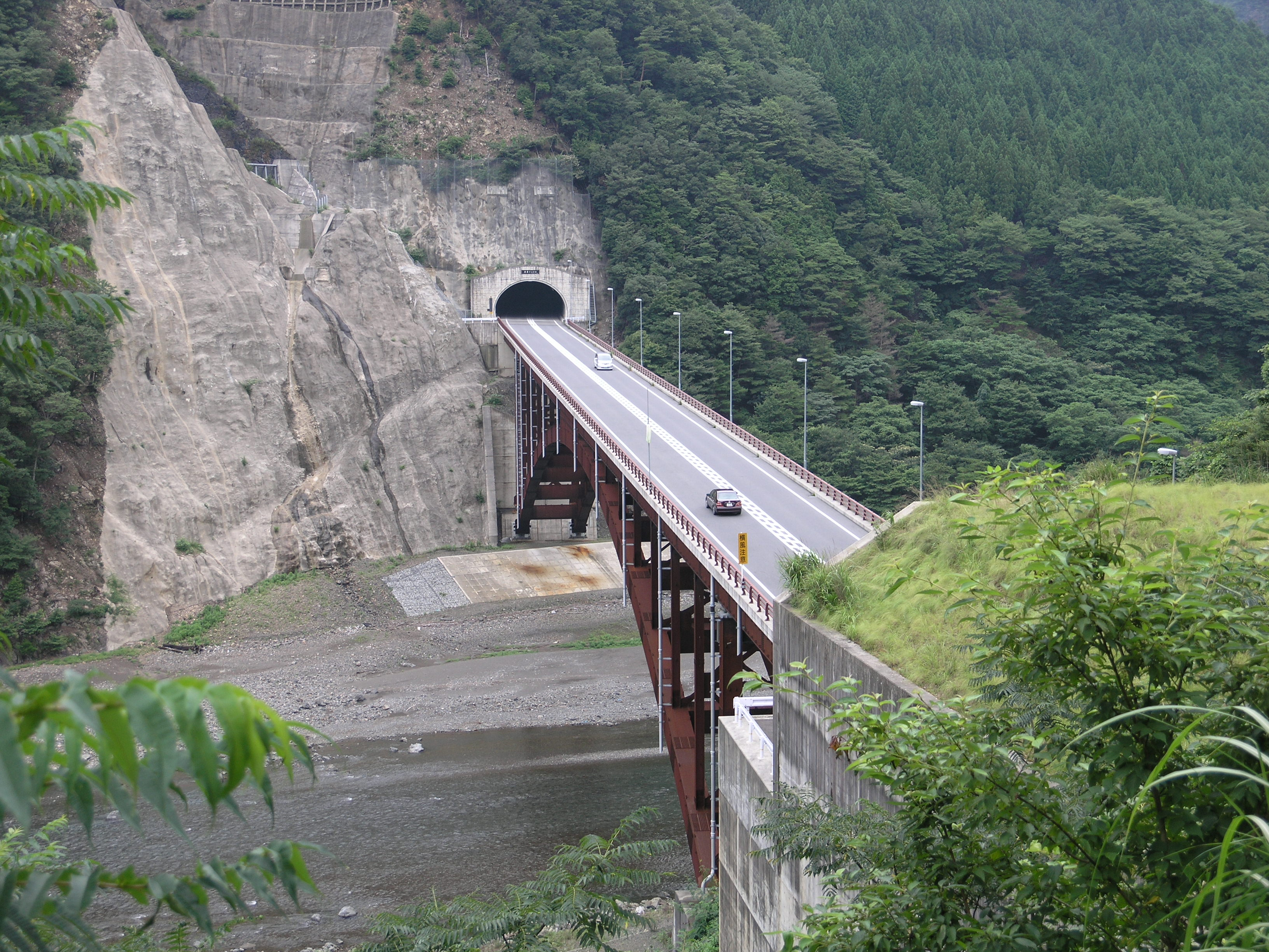 国道168号宇宮原バイパス岩原トンネルと田長瀬橋 (奈良県吉野郡十津川村) 2010年08月撮影。 機材：C8080WZ 撮影者：Kansai explorer